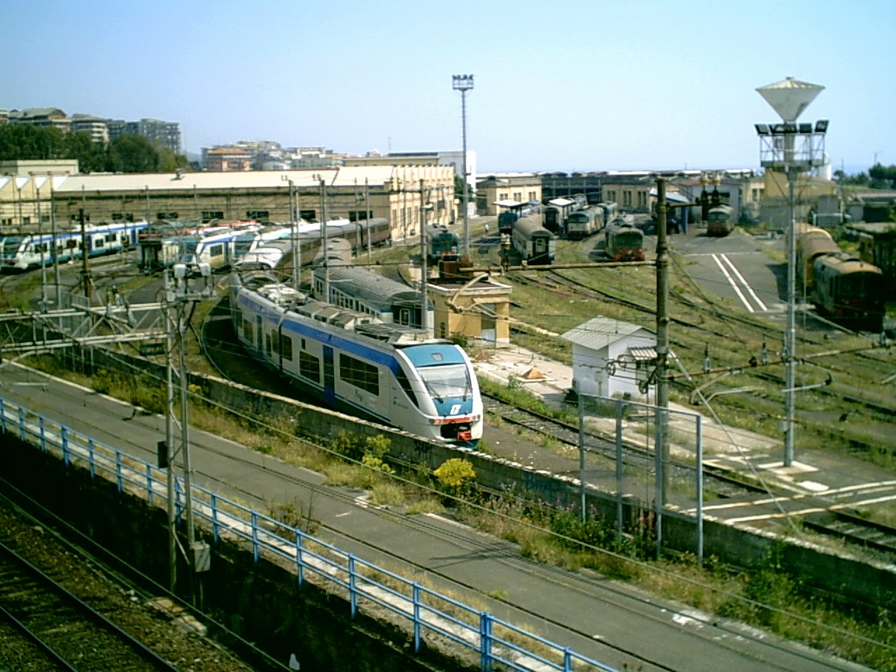 Foto di Infrastruttura